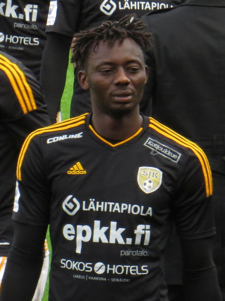 Cedric Gogoua, norsunluurannikkolainen jalkapalloilija Seinäjoen Jalkapallokerhon paidassa kaudella 2015.